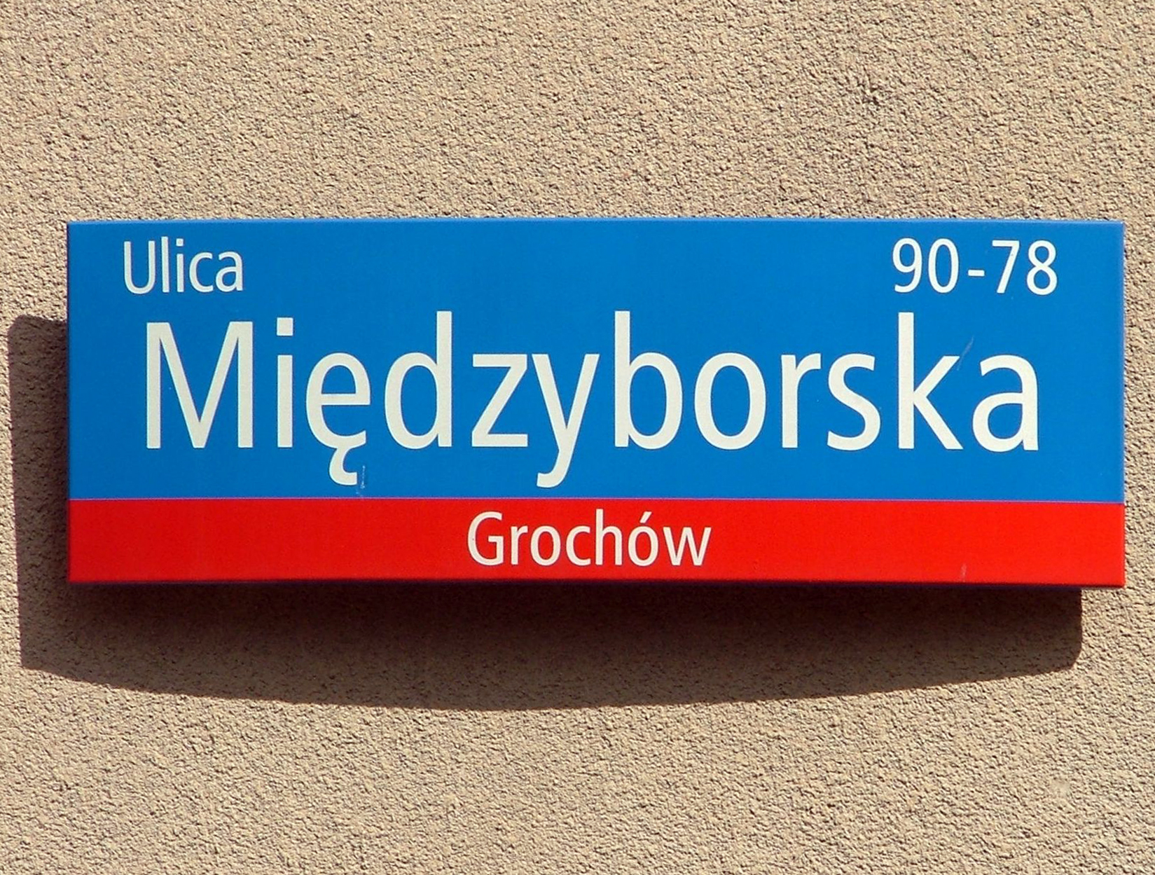 pl, Warsaw, Poland, Praga Południe, Grochów, ulica Międzyborska